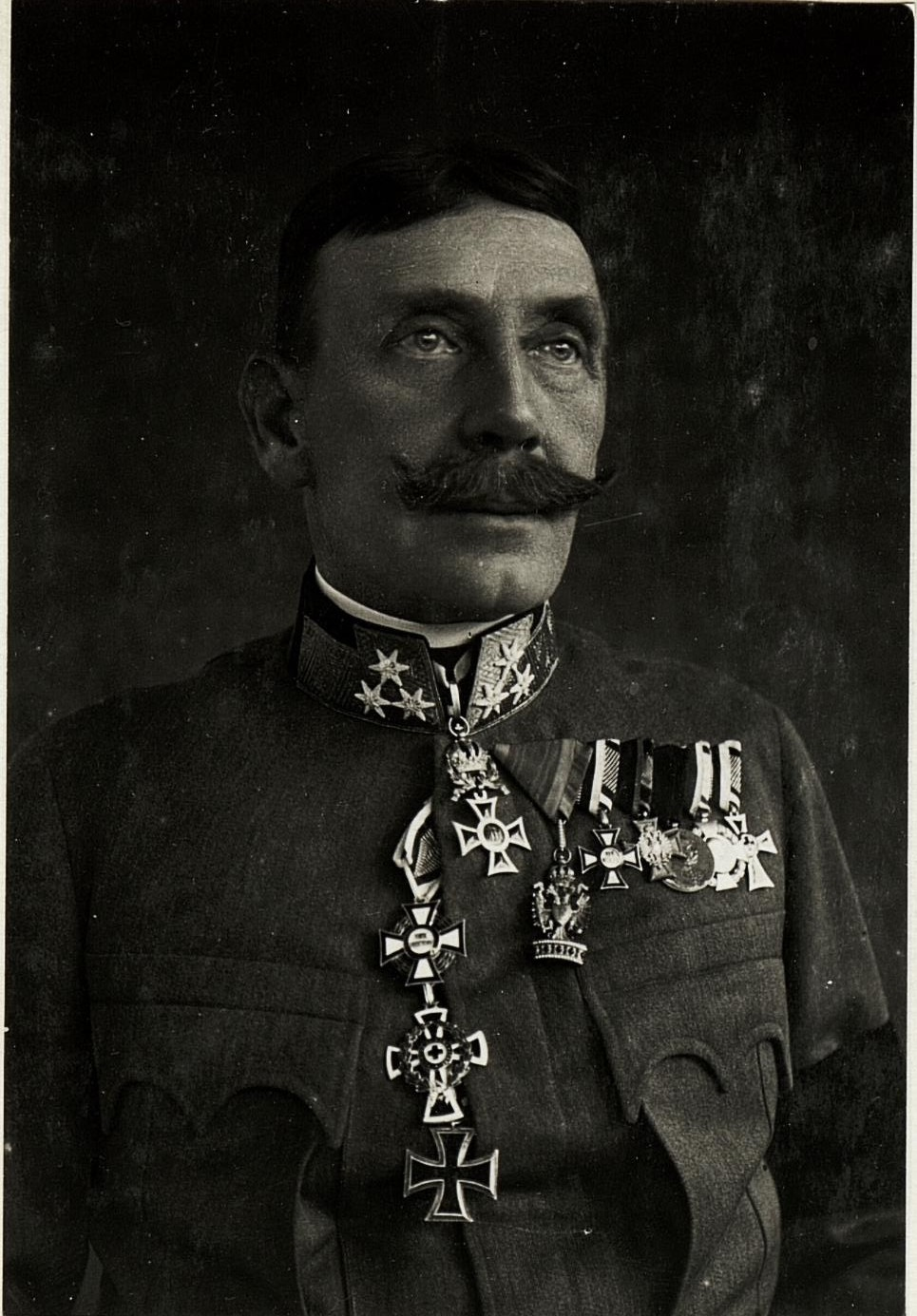 General d. Infanterie Ludwig Können-Horak Edler von Höhenkamp, Rayonskommandant Südtirol.